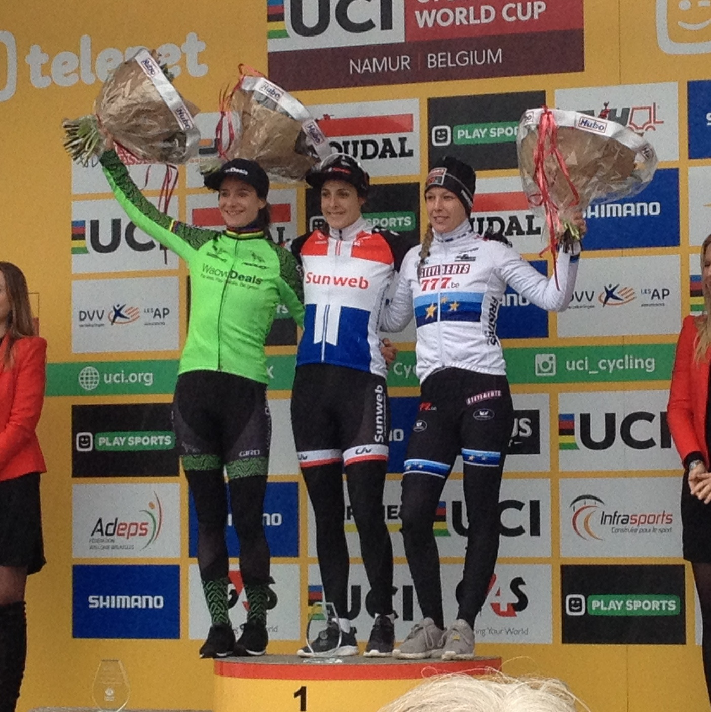 Podium Wereldbeker veldrijden op de Citadel van Namen op zondag 23 december 2018